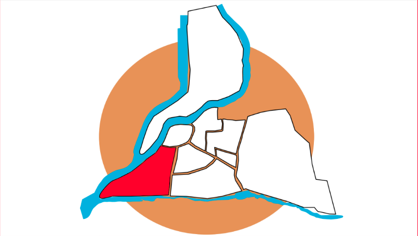 Emplacement du Quartier Ouest sur la carte d'Avignon.